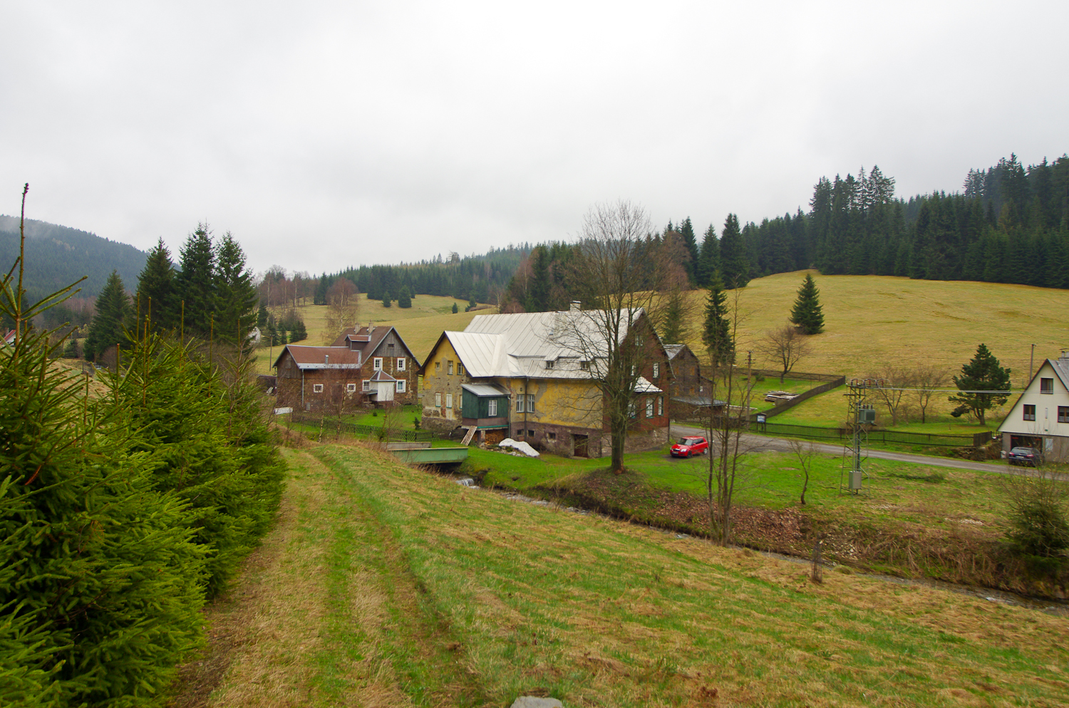 Zlatý Kopec, Krušné hory, okres Karlovy Vary